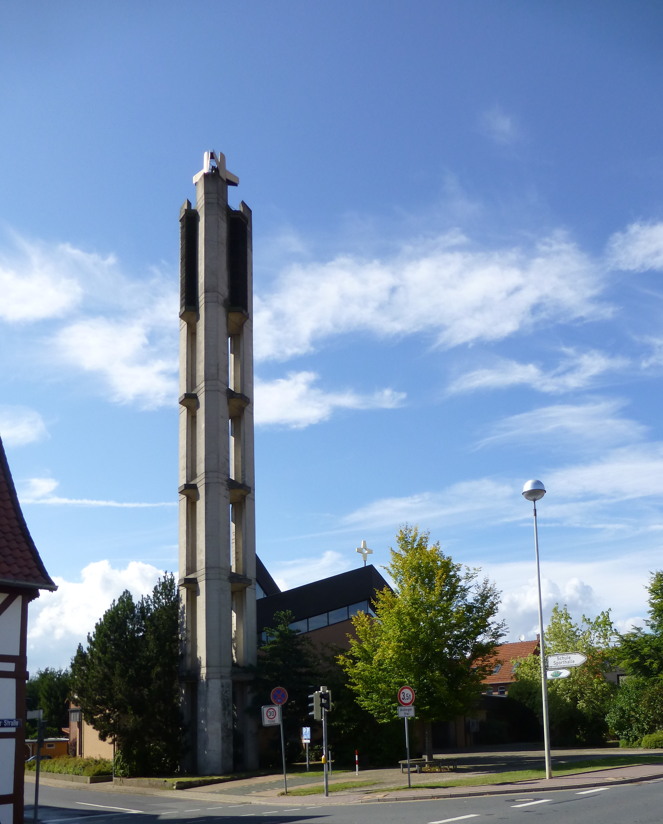 Katholische Pfarrkirche Mariä Geburt in Gerblingerode, Eichsfeld, Landkreis Göttingen.Erbaut 1970